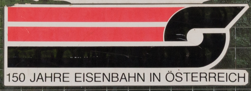 Logo „150 Jahre Eisenbahn in Österreich“ in Form eines Logos. Ausschnitt aus der Datei File:Austrotakt-Aufkleber am Bahnhof Bad Hofgastein.jpg